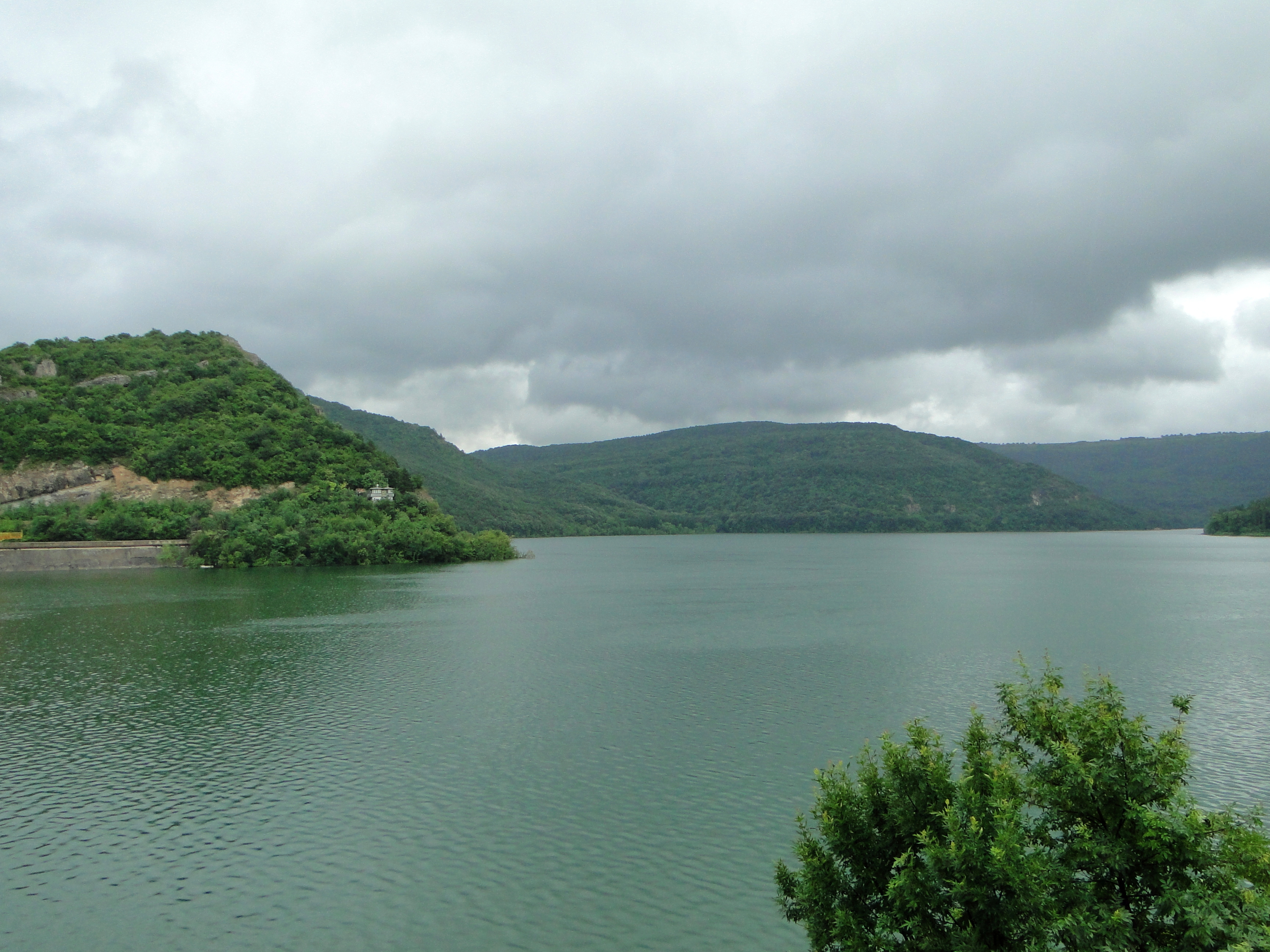 Язовир "Александър Стамболийски"